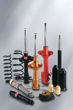 Prodotti KYB